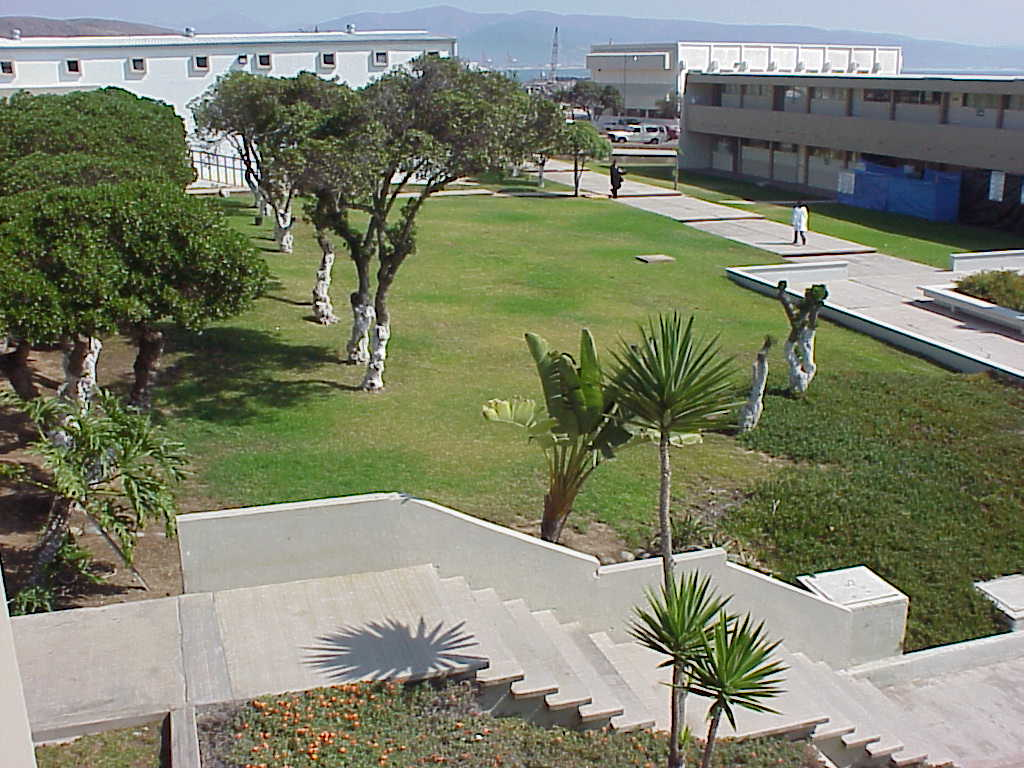 Áreas Verdes de las Ciencias Marinas, Campus de la UABC en Ensenada.